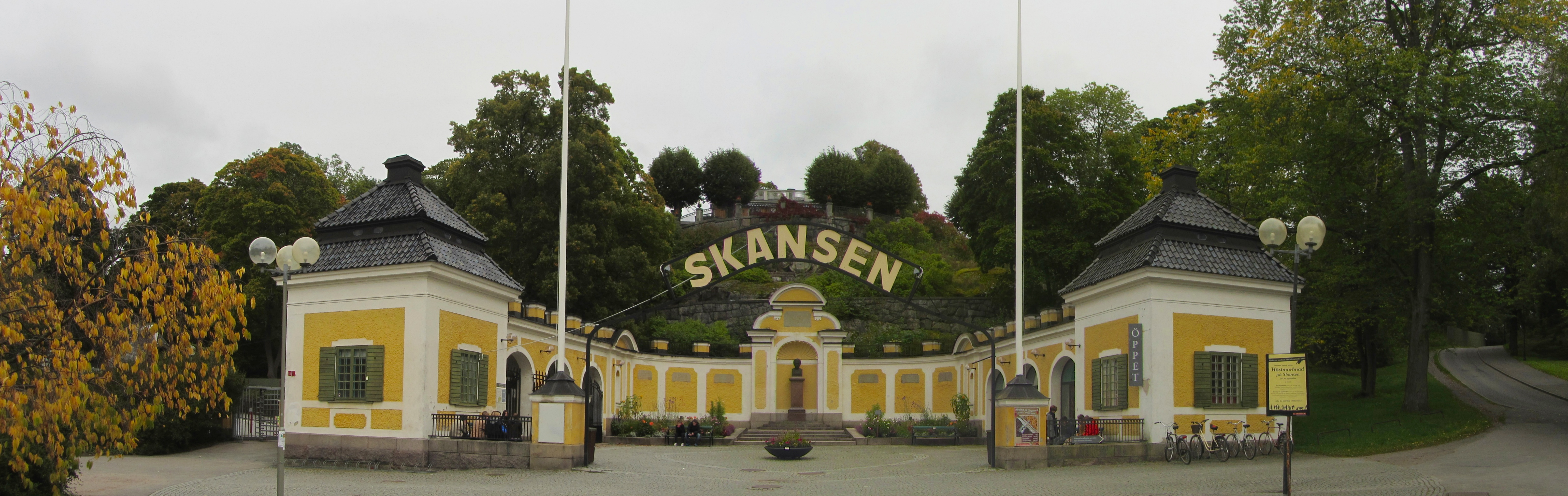 Eingangsgebäude Skansen (Stockholm)